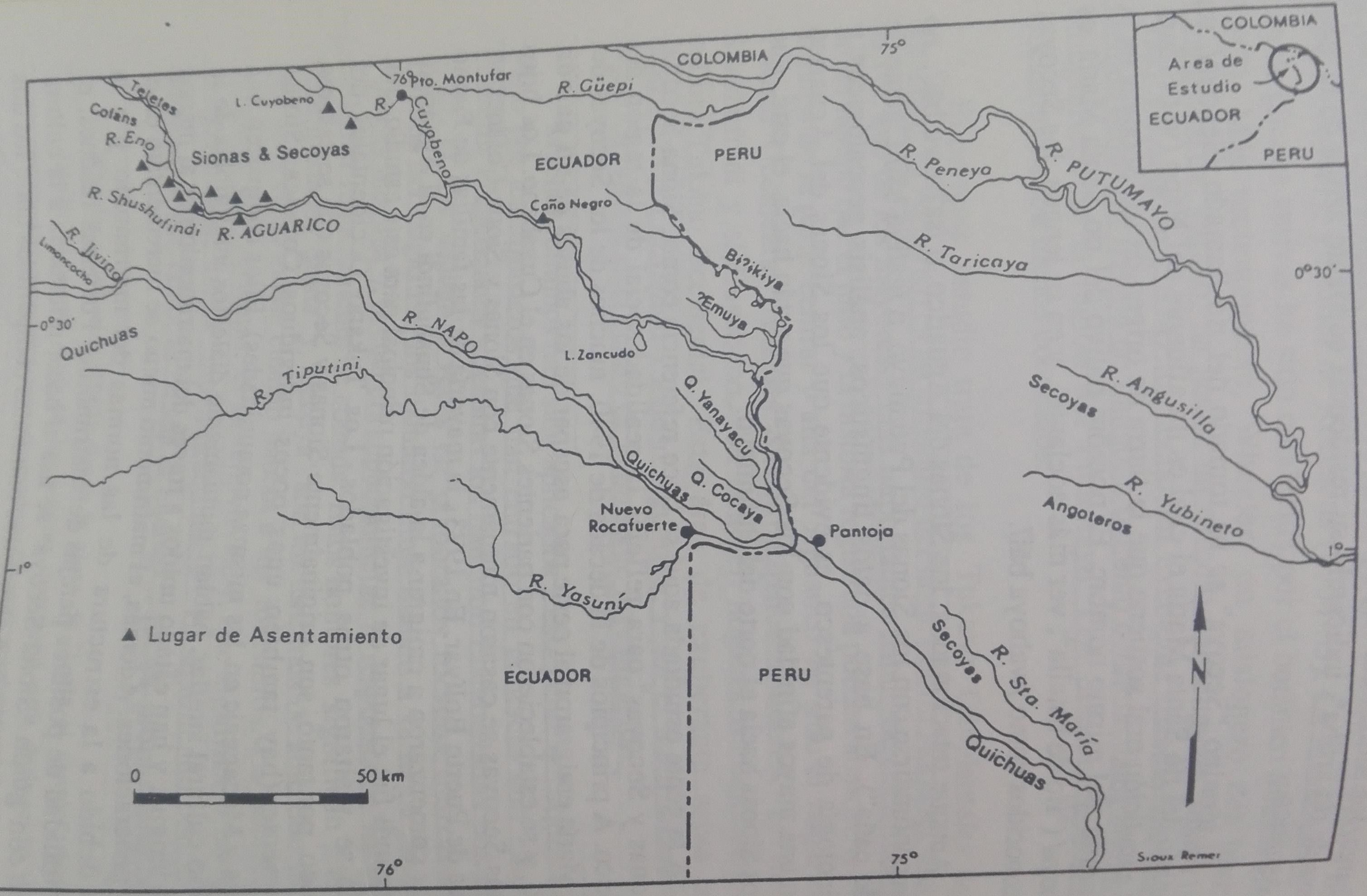 Mapa geogràfic sobre la localització del grup Siona-Secoya